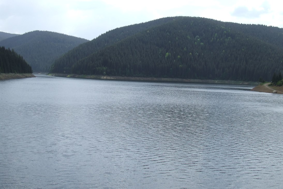 View from Fântânele Lake, Cluj County, Romania